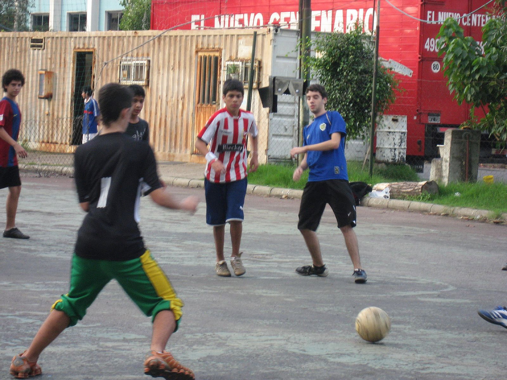 Buenos Aires. Fútbol en la calle